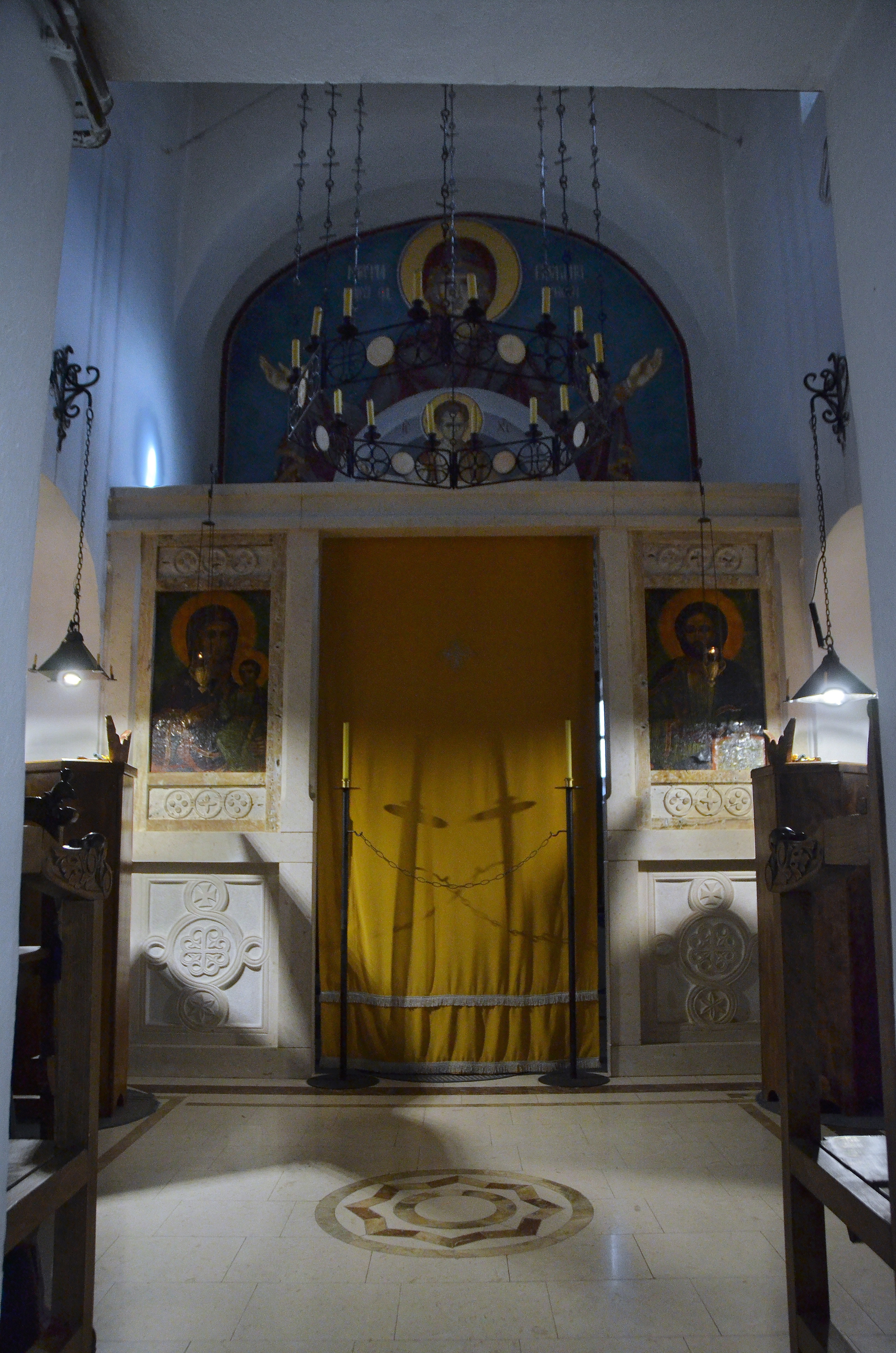 Храм се састоји из две мање цркве које имају заједничку припрату. Са северне стране је црква Успења Пресвете Богородице, а са јужне параклис Седморице ефеских мученика.